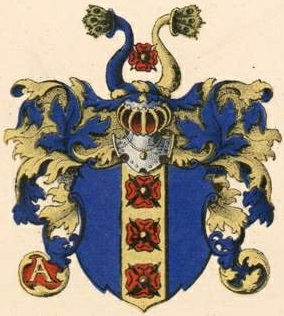 Rentelni suguvõsa aadlivapp